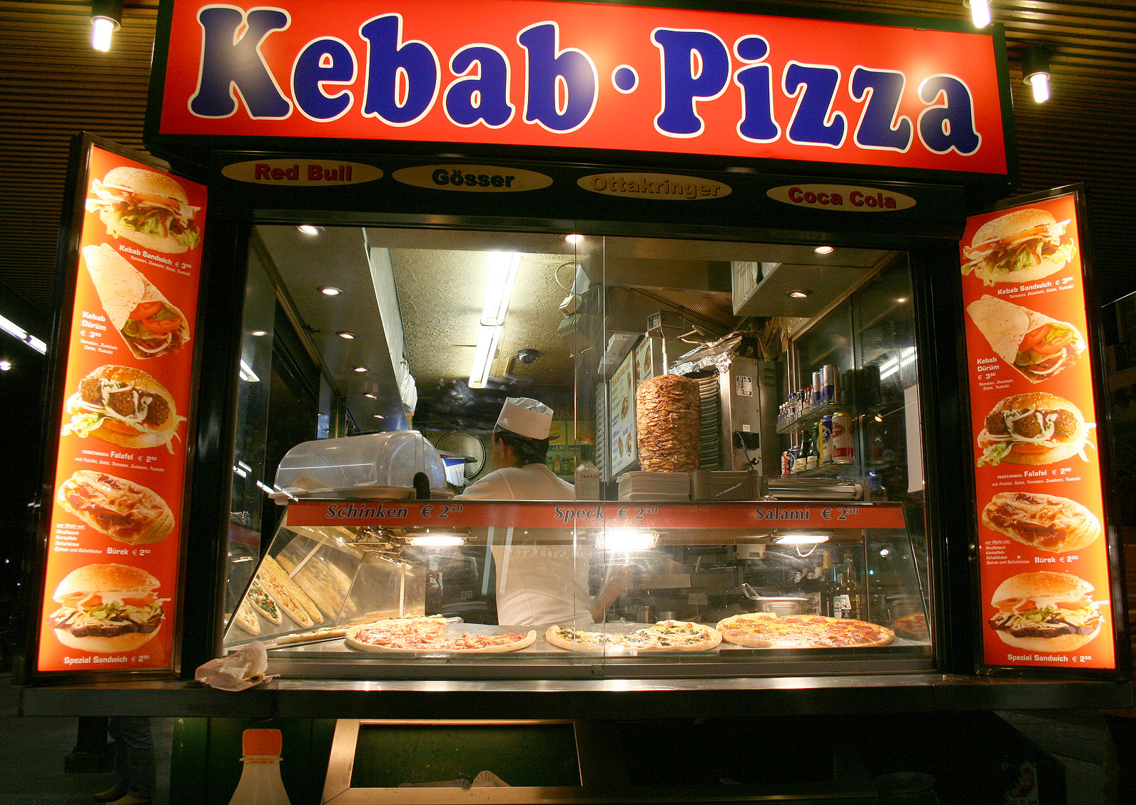 Kebab und Pizza-Imbiss; Bellaria, Wien (Österreich) / Kebab and Pizza-snack-foot; Bellaria, Vienna (Austria)